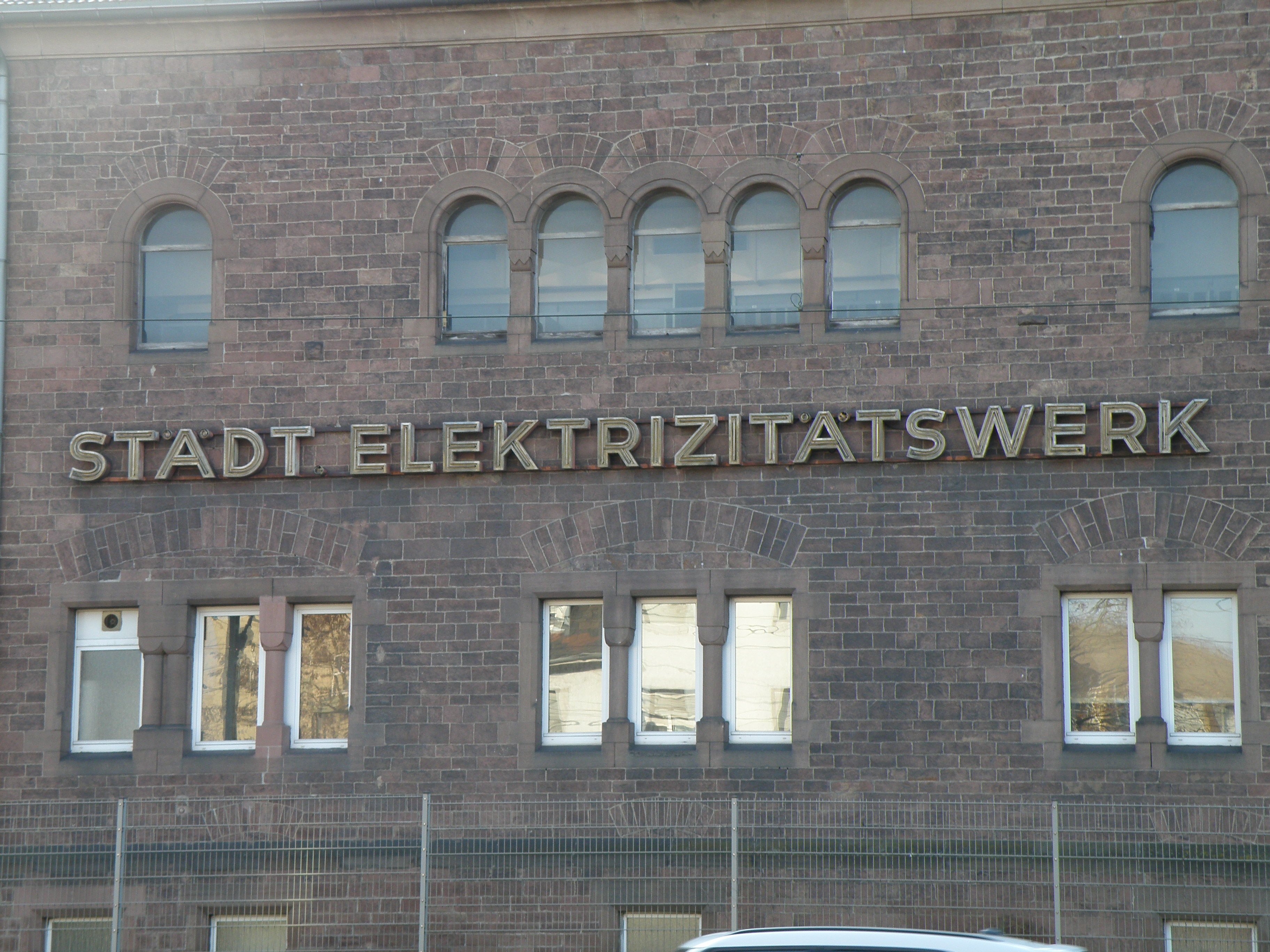 Heizkraftwerk-West (Karlsruhe) 2011-11-28d